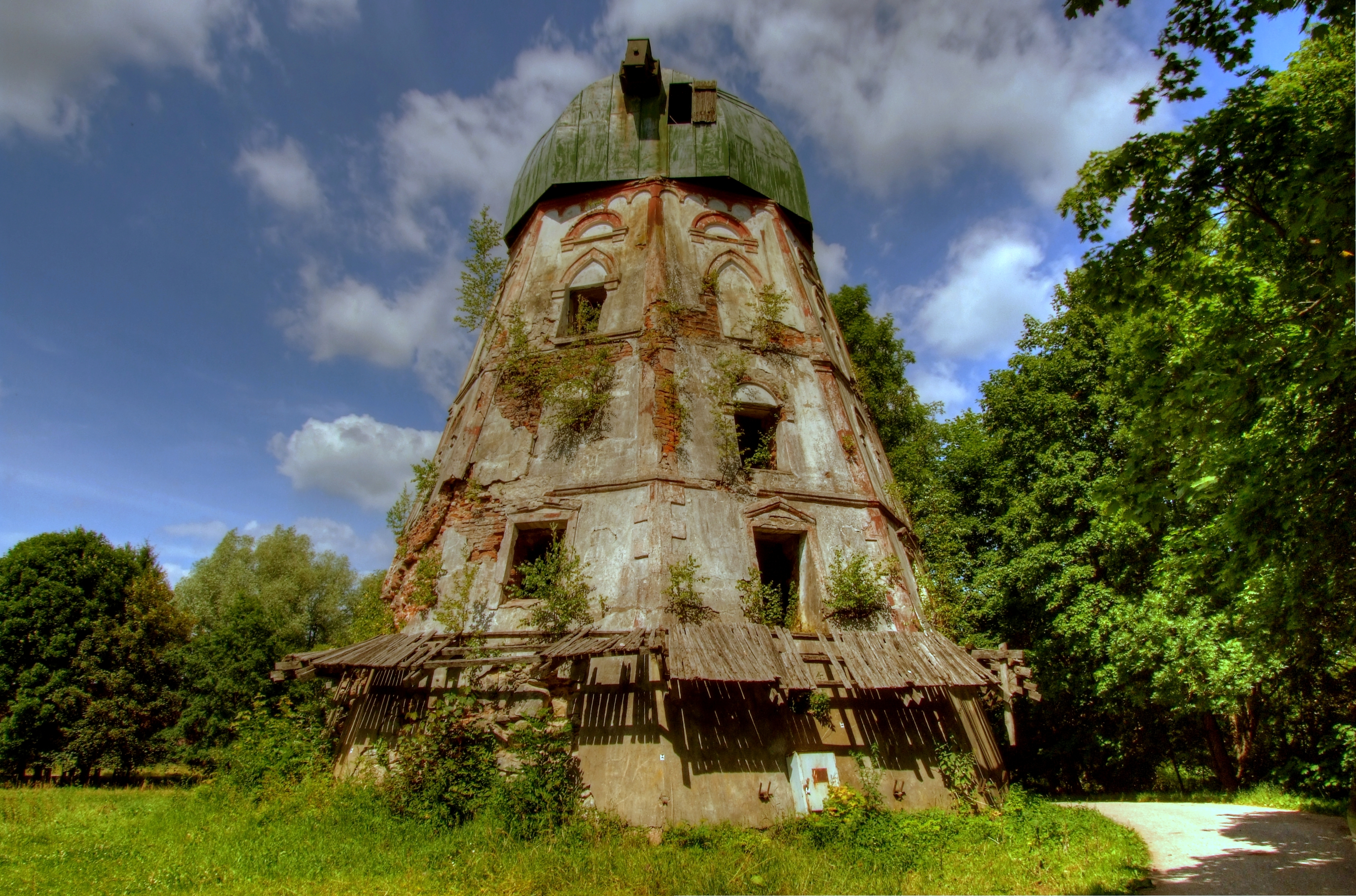 Baisogalos dvaro vėjo malūnas